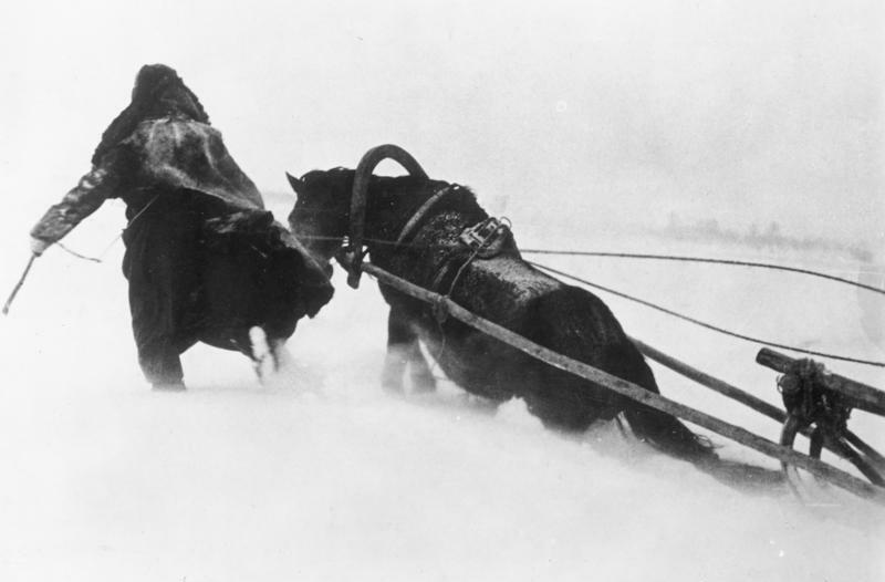 Prop.Kp. Nr. 693-Archiv-Nr. 366/ Bildberichter: Lachmann Ort: bei Minsk - Datum: 15.1.42 Text: Der Panje-Schlitten kommt überall durch. Hornberg "Frei" O.K.W. Eingeg. Bildpr. 9. Febr. 1942 Send-Nr. 927/42